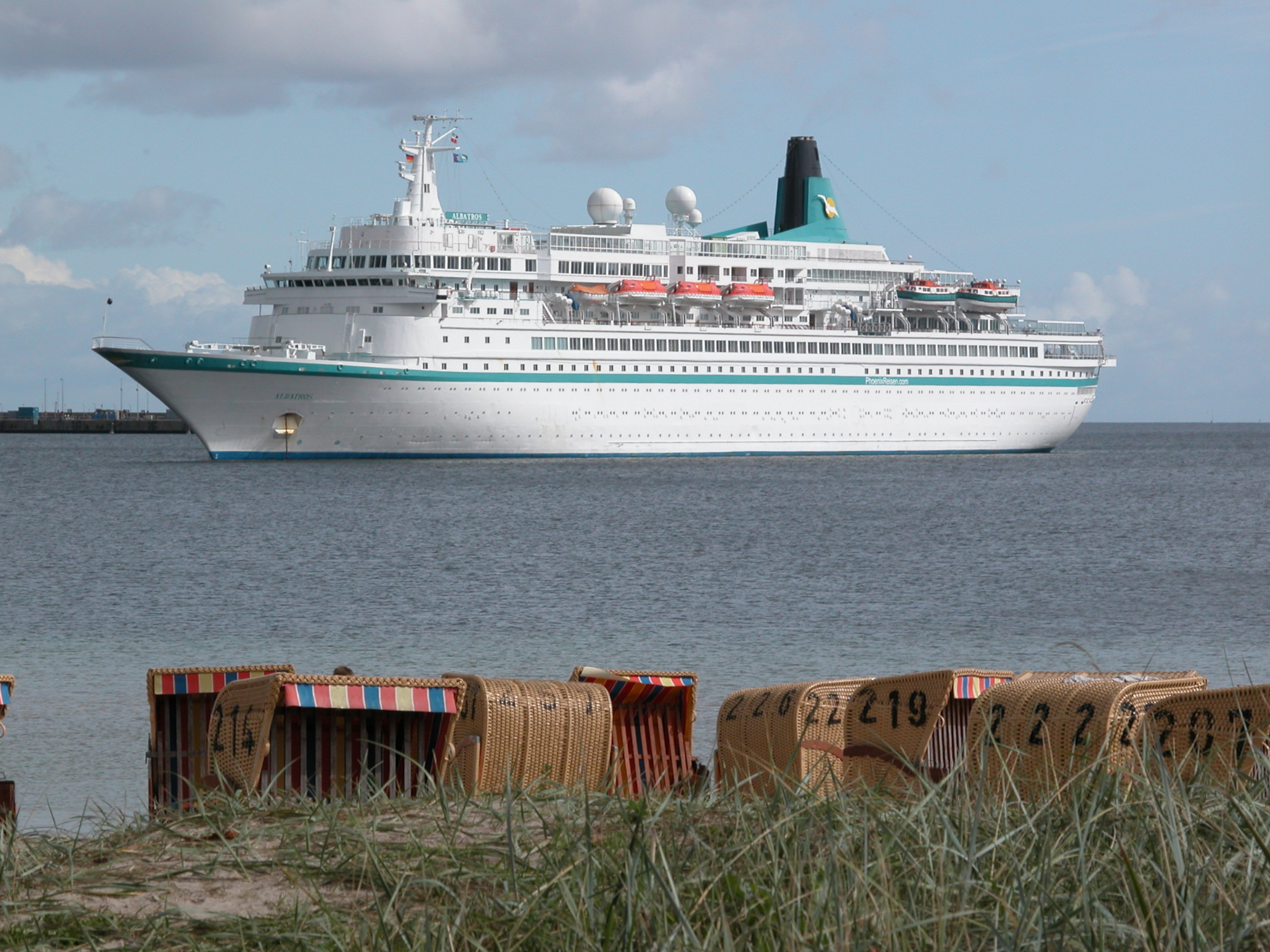 Albatros in Eckernförde